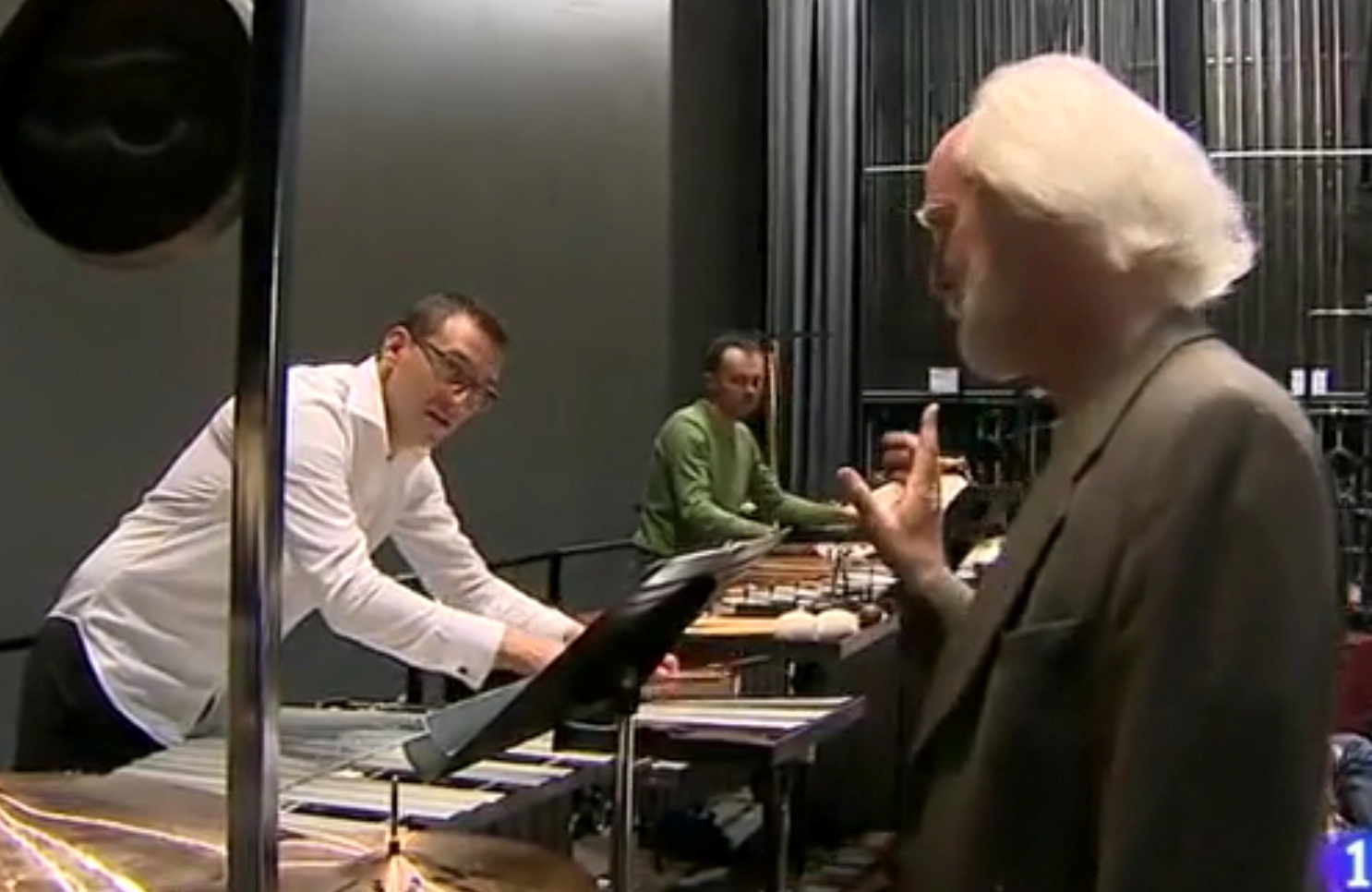 Grup Instrumental de València og komponisten Lars Graugaard